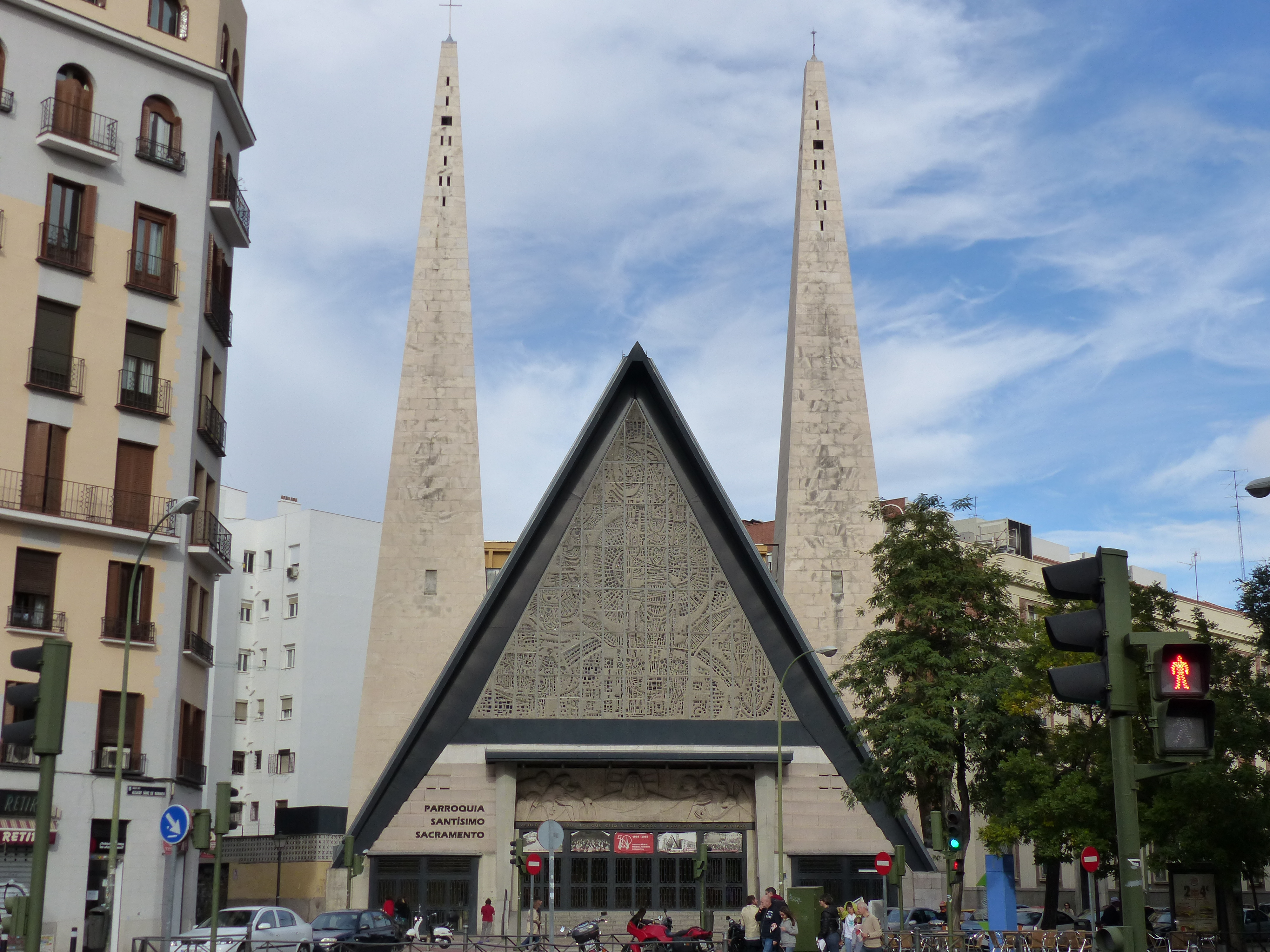 Parroquia del Santísimo Sacramento, fachada principal.